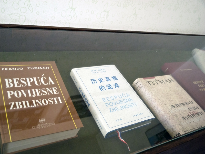 Bespuća povijesne zbiljnosti u Velikom Trgovišću